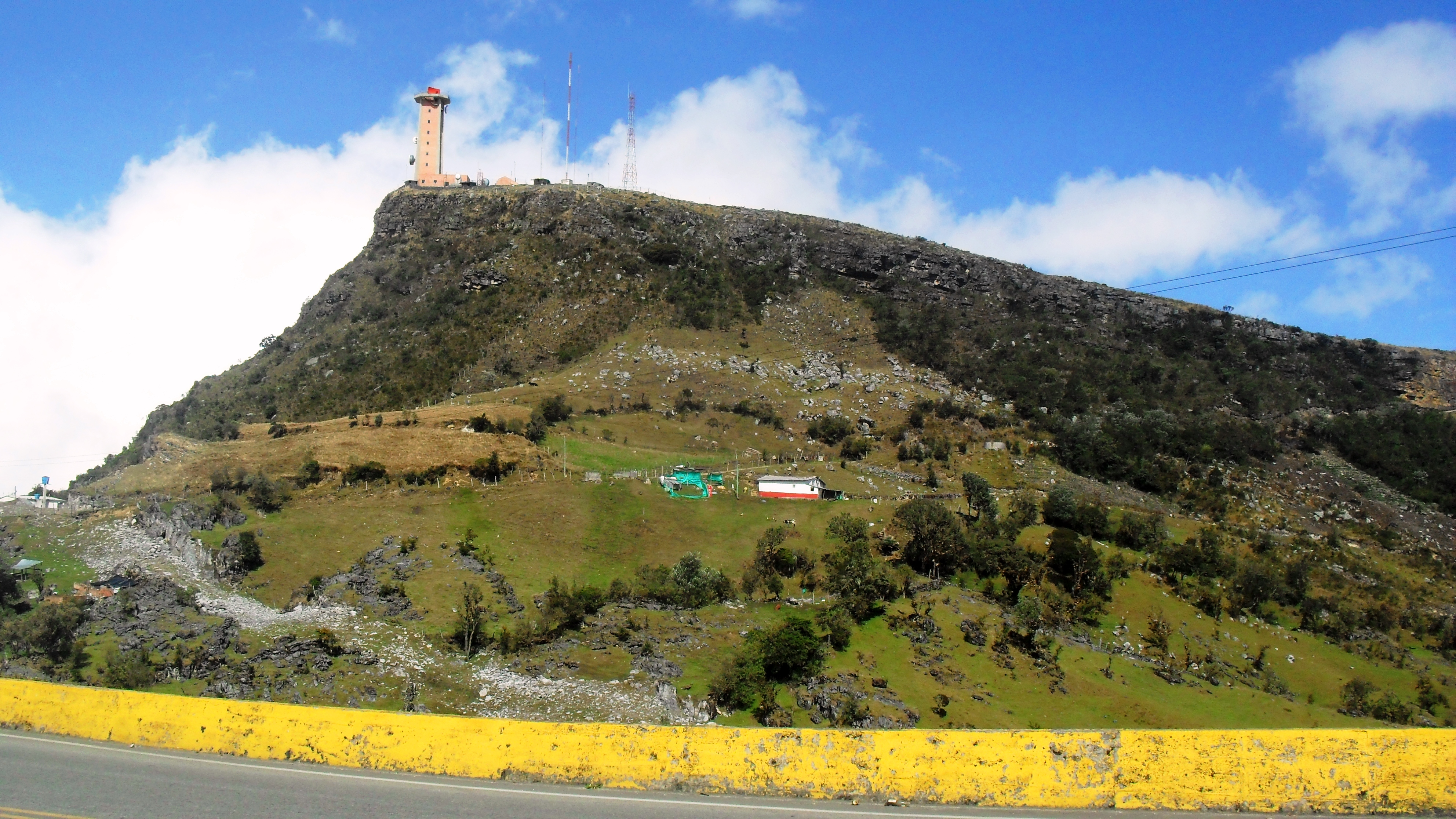 Paramo el Picacho a 3400 m sobre el nivel del mar.